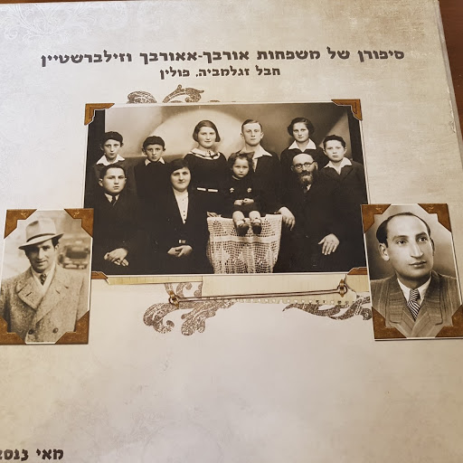 ספר על תולדות משפחת אורבך-אאורבך וזילברשטיין שתחילתו מהעיר בנדין